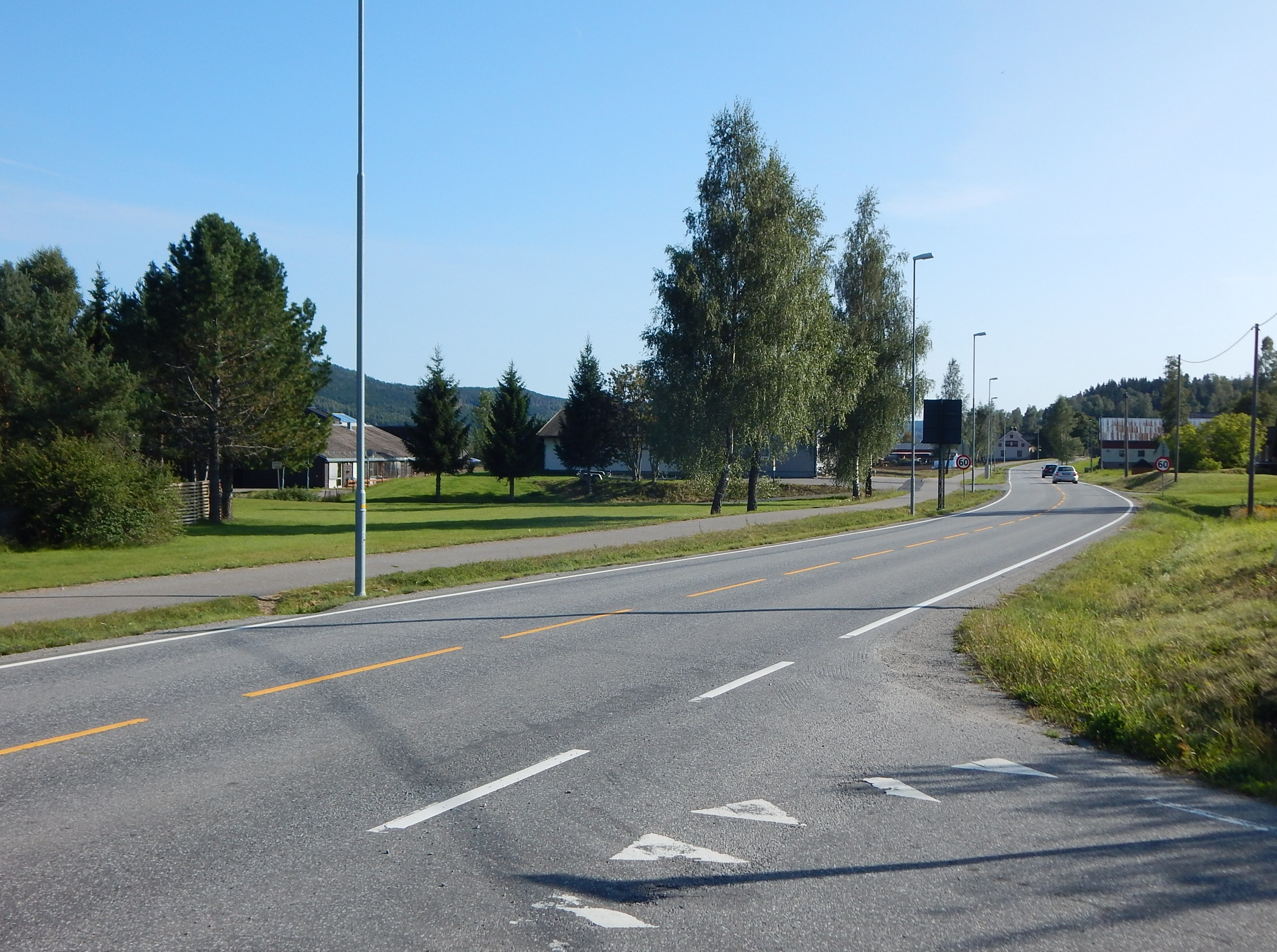 Vestsidevegen sørover i Hurdal